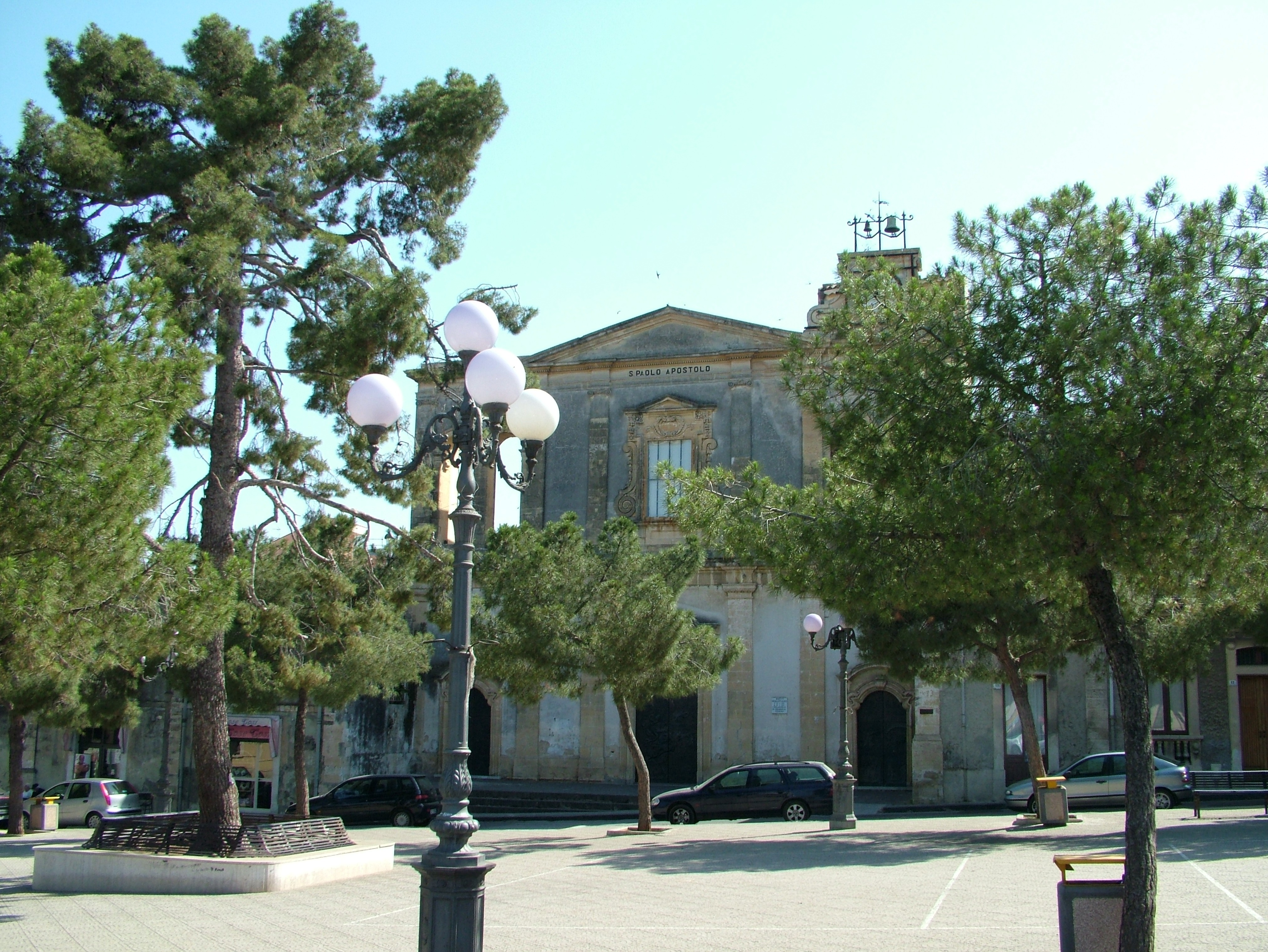 Solarino, Sizilien, Provinz Syrakus, die Kirche S. Paolo Apostolo